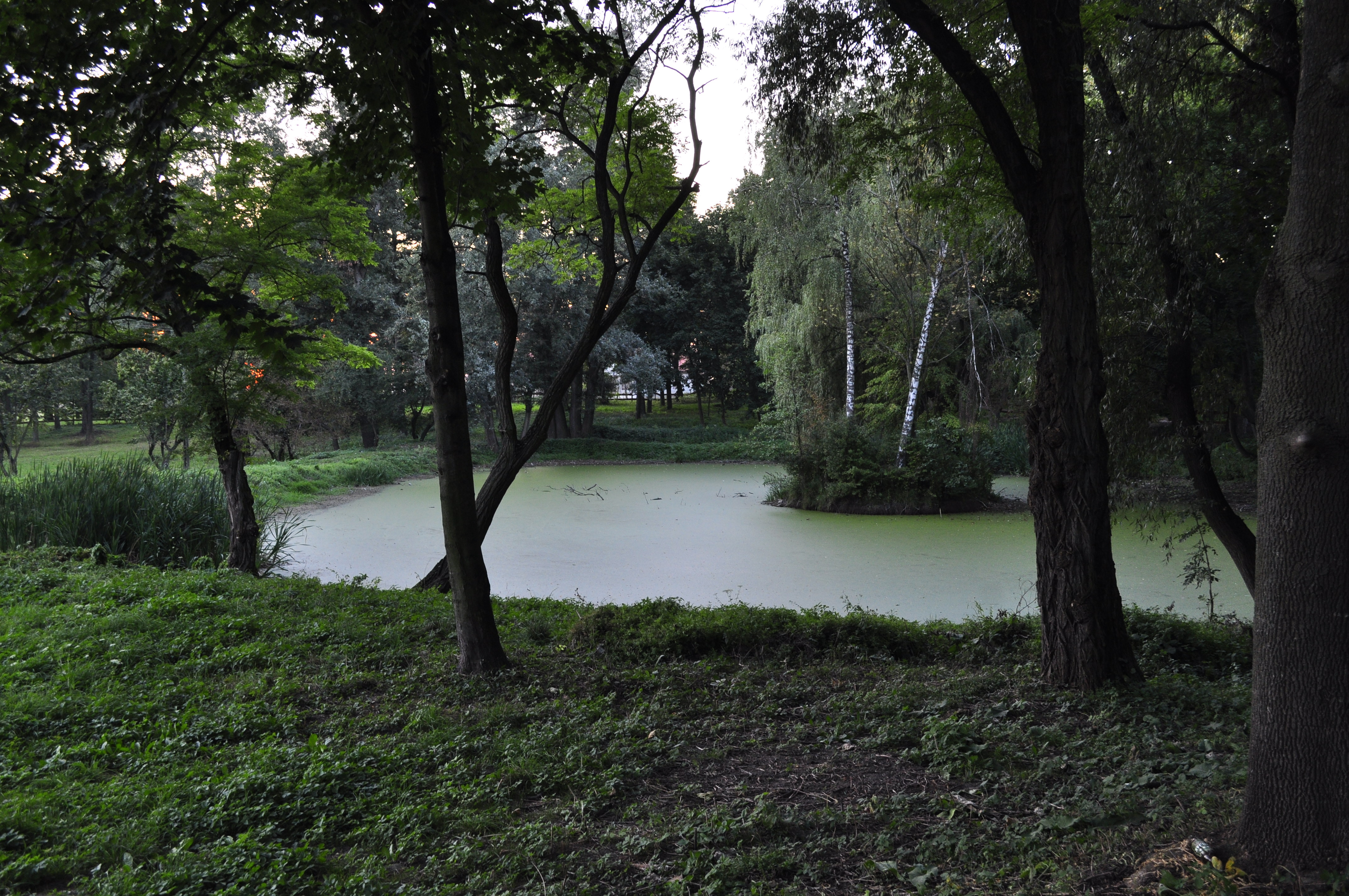 Park Czajęcice, Waśniów 618 z 13.12.1957.